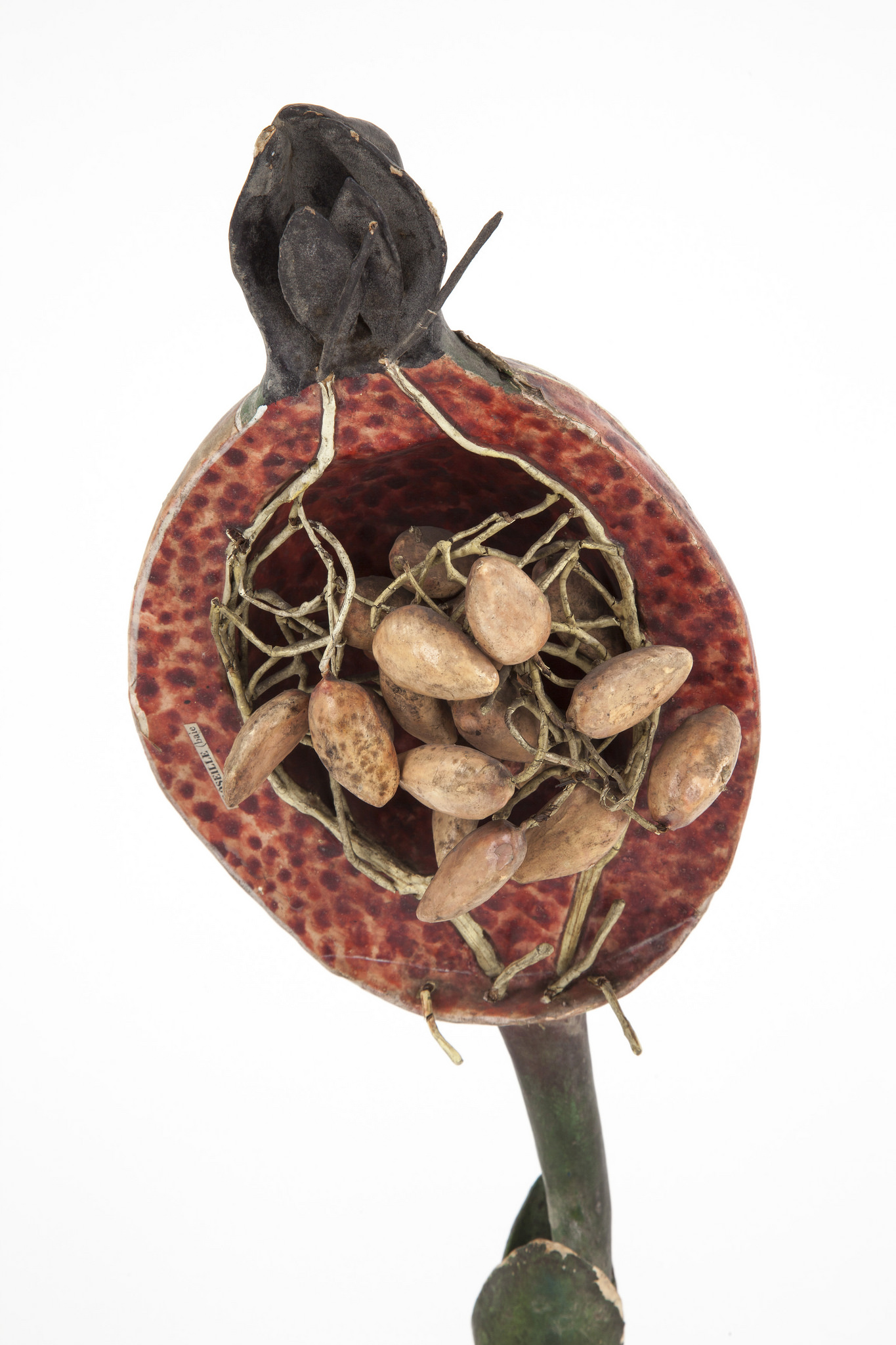 Modèle pédagogique en papier-mâché Dr. Louis Auzoux 1877 Collection du Musée national de l'Education - Rouen 2009.00518